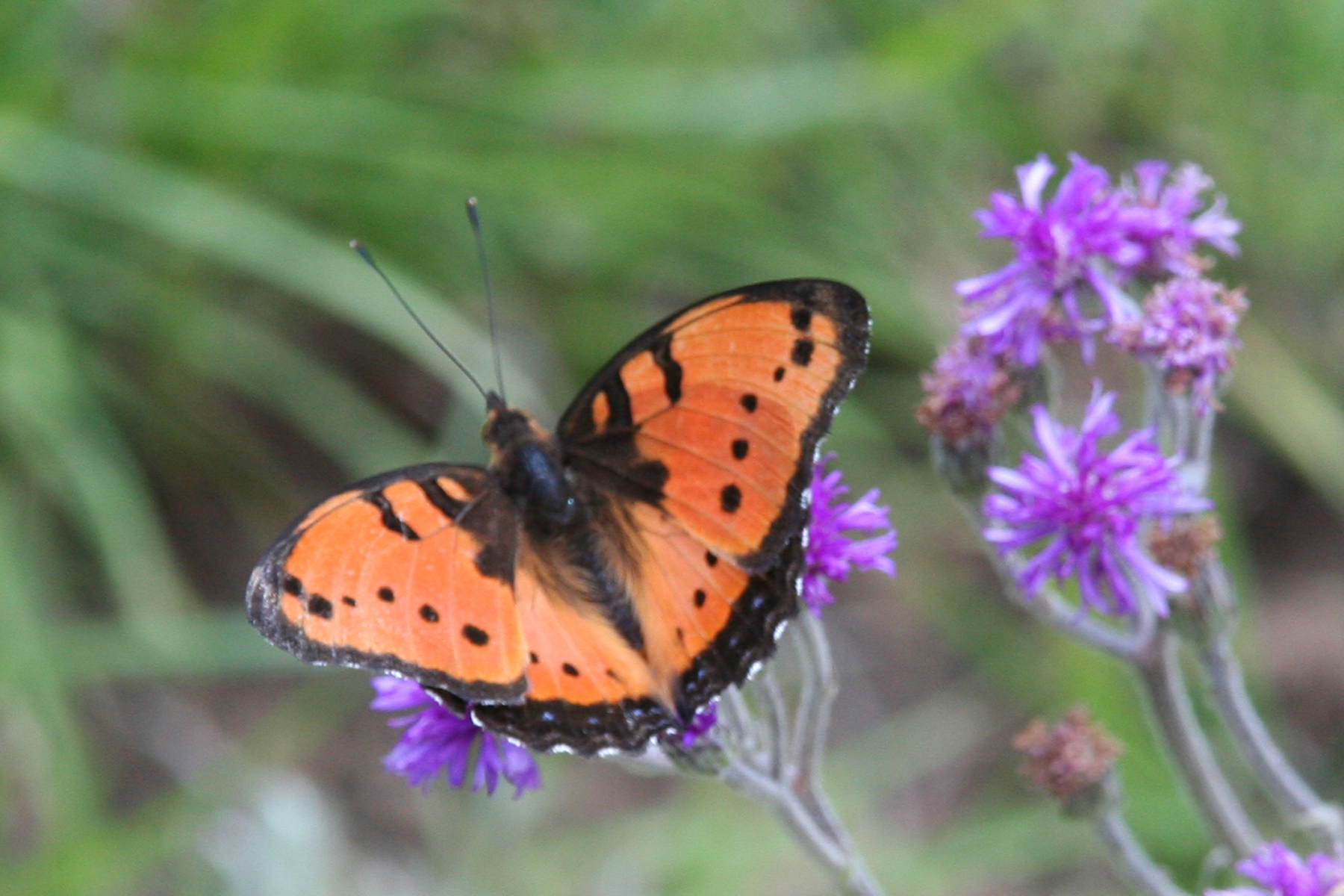 Precis octavia (Cramer, [1777]), Gaudy Commodore, P. o. sesamus Trimen, 1883